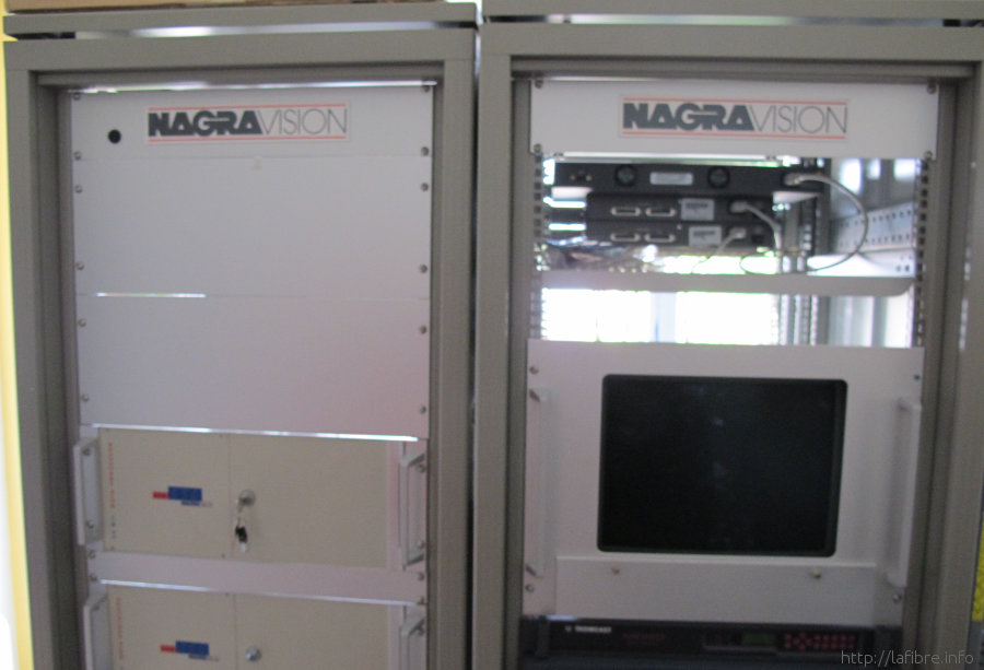 Baies NagraVision CityPlay Amiens